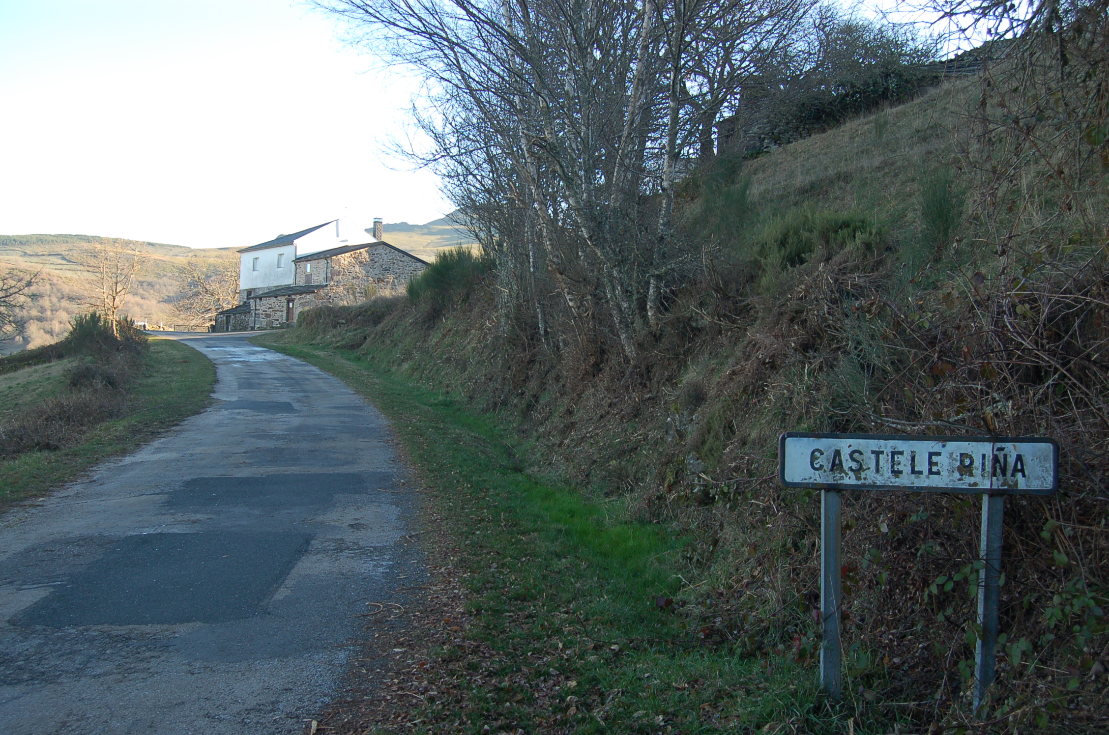 Aldea de Castelariña